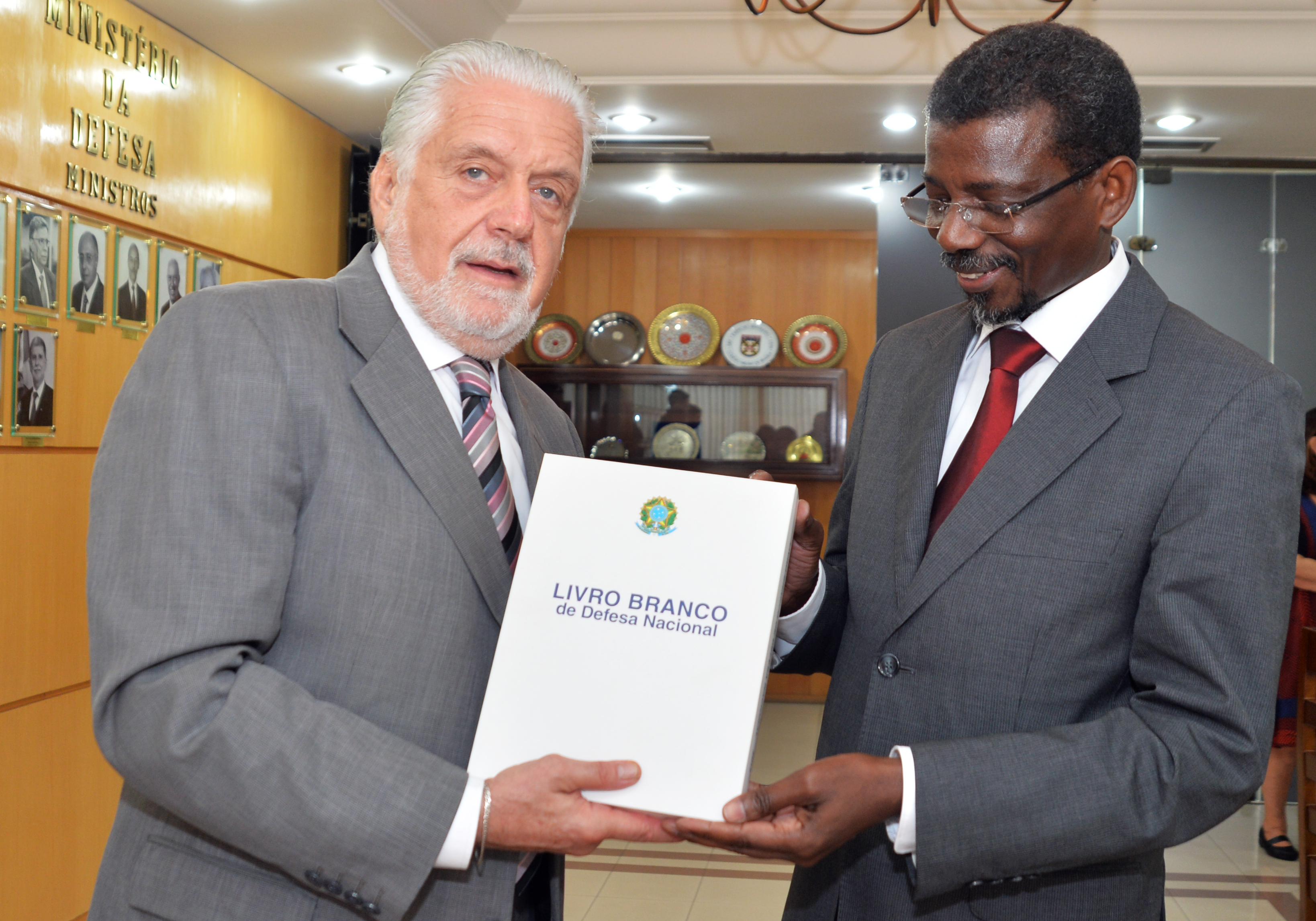 23/03/2015, Brasília - DF Fotos: Jorge Cardoso